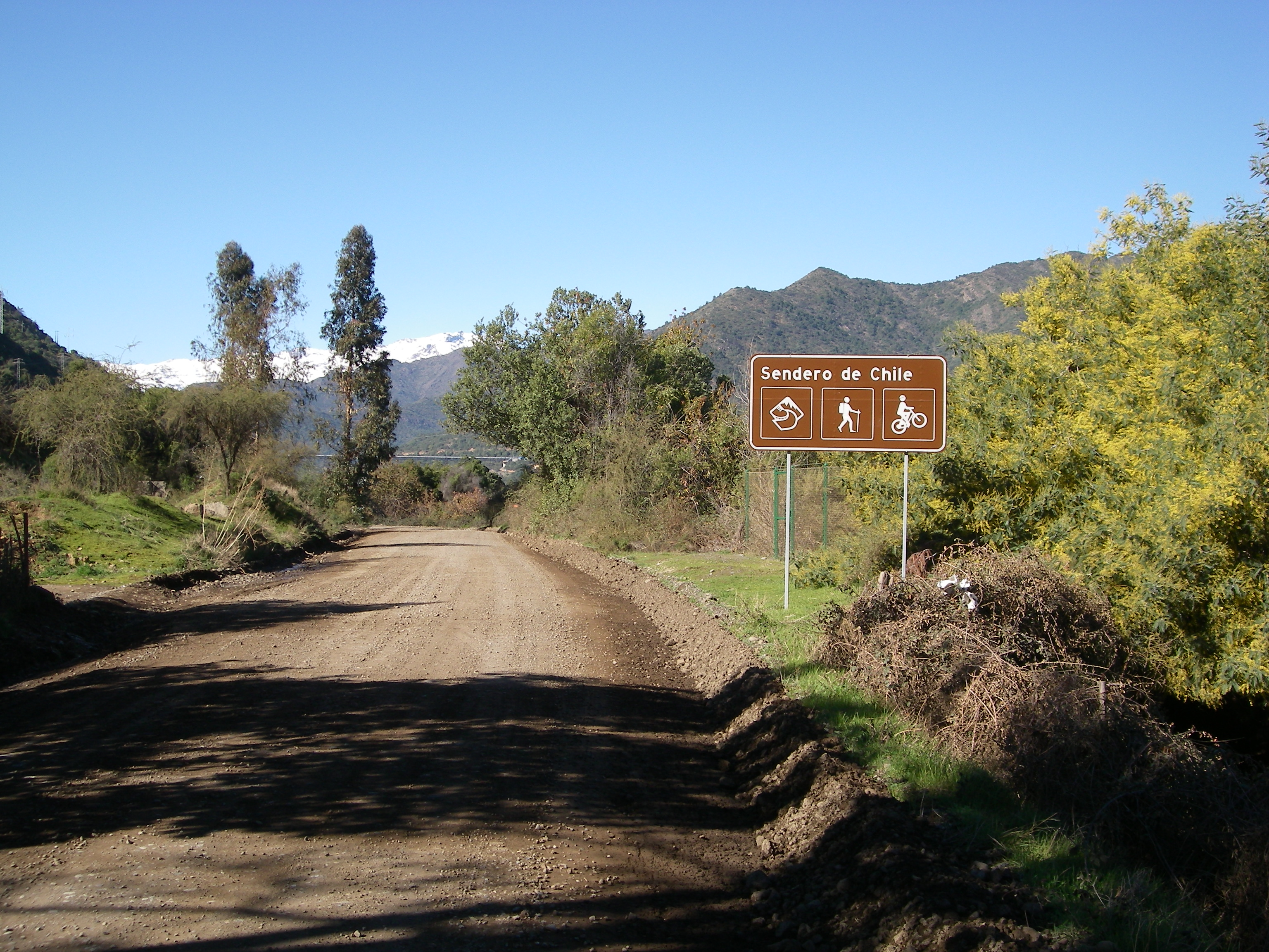 A la izquierda, Sendero de Chile.